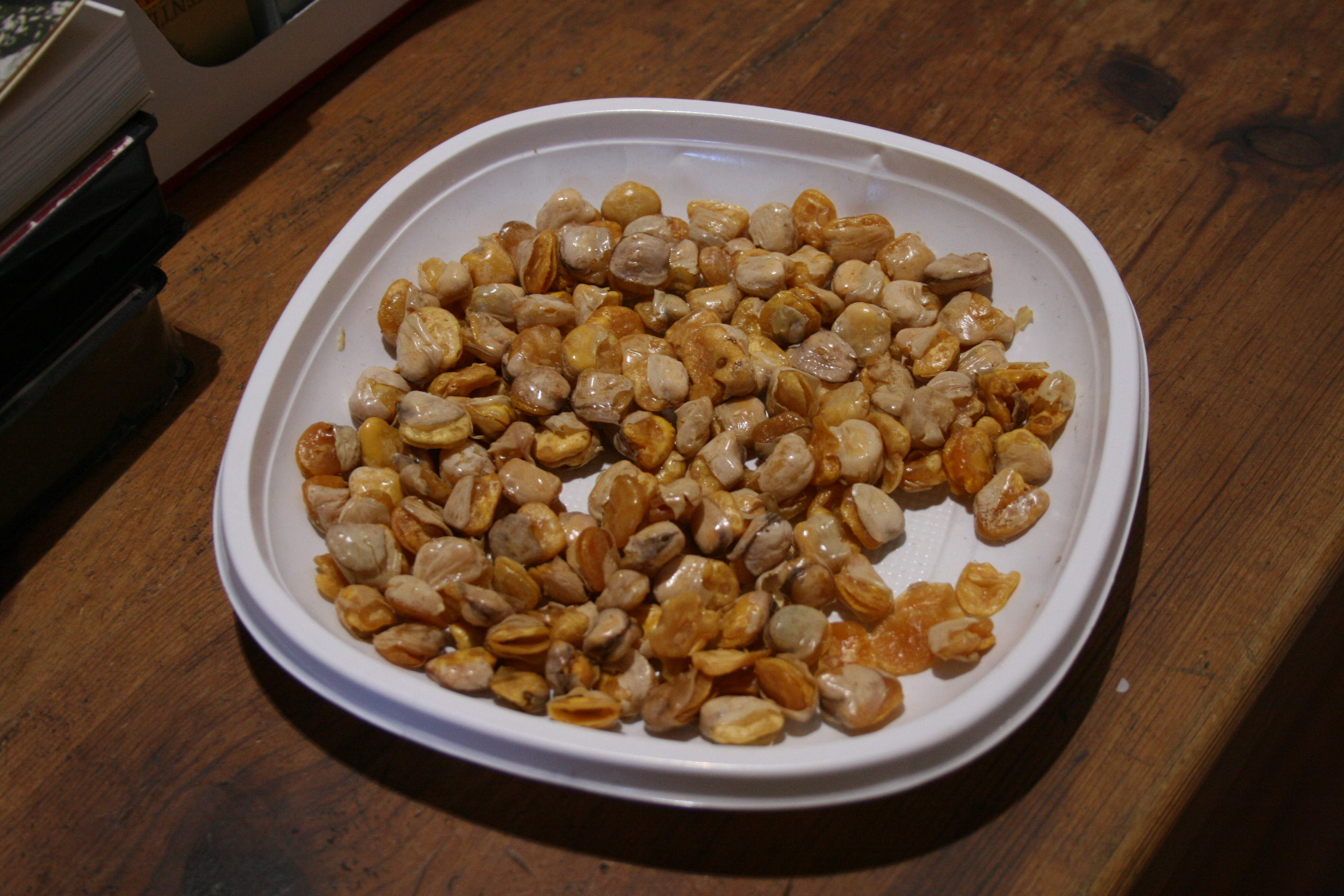 Bandeja de Titos